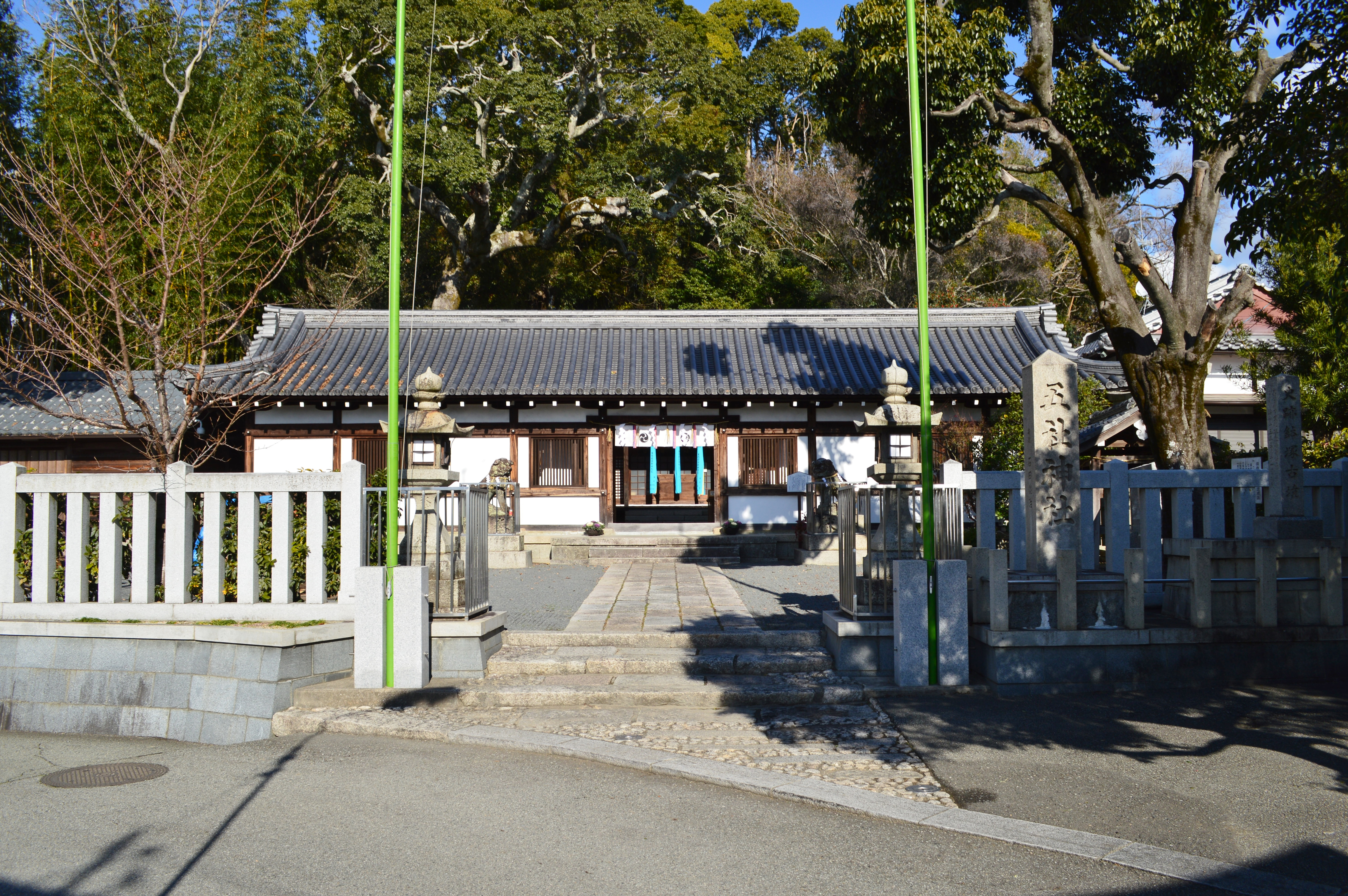 五社神社 (池田市) 境内入り口